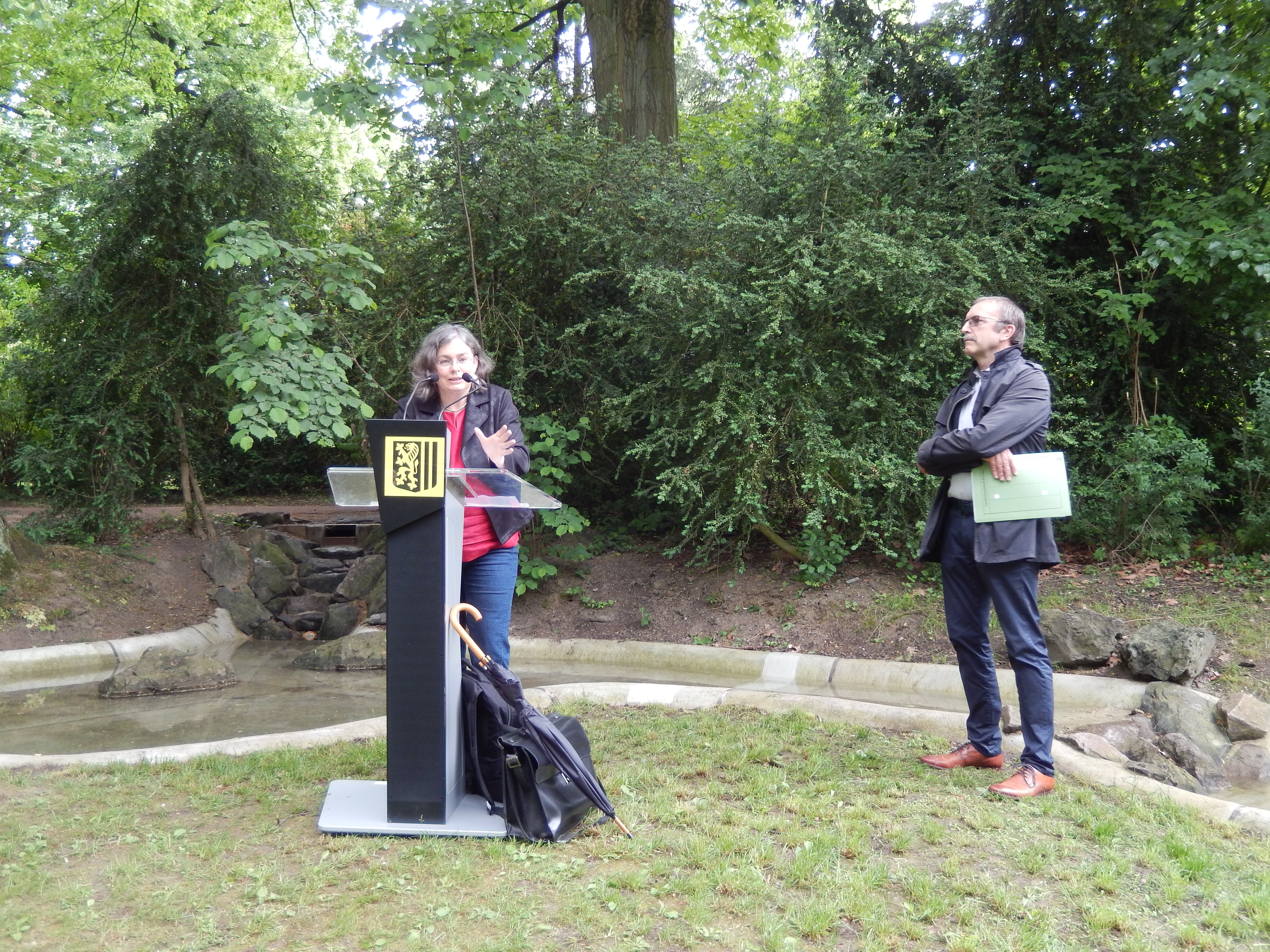 Der Fichtepark in Dresden-Plauen ist 1891 zunächst als „Westendpark“ eröffnet und erhielt fünf Jahre später den charakteristischen Bismarckturm. Im Jahr 1903 kam eine großflächige Teichinstallation hinzu. Sie hat einen Wasserlauf, der im oberen Parkbereich einer Quelle entspringt und in den unten gelegenen Teich mündet. Anlässlich des 175. Geburtstages von Johann Gottlieb Fichte, einem bedeutenden deutschen Philosophen, wurde der Park 1937 in „Fichtepark“ umbenannt. 1954 erhielt der Bismarckturm den Namen „Fichteturm“. Bachlauf und Teich sind zuletzt 1992 saniert worden. Über die Jahre wurden Wasserrinne, Staustufen und Brunnenbecken marode. Die Wasserverluste waren so hoch, dass die Anlage 2013 trockengelegt werden musste. Am 15. Mai 2018 wurde die Teichanlage feierlich wieder in Betrieb genommen.Bürgermeisterin Eva Jähnigen Beigeordnete für Umwelt und Kommunalwirtschaft und Detlev Thiel, .Amt für Stadtgrün und Abfallwirtschaft halten die Eröffnungsansprachen.